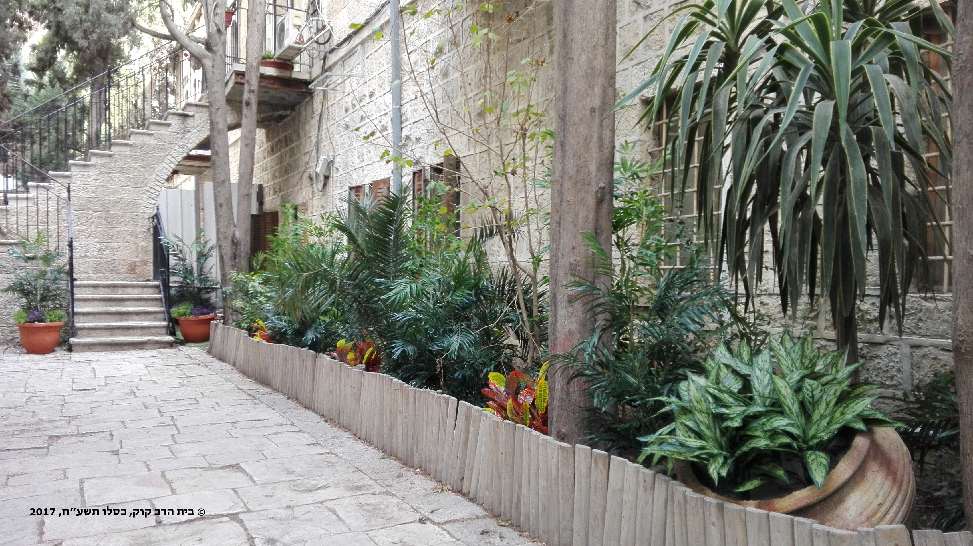 במבנה זה שכנה ישיבת מרכז הרב מהקמתה בשנת תרפ"ד (1924) ועד שנת 1964 -אז עברה הישיבה למשכנה בשכונת קרית משה בירושלים, שם היא שוכנת עד היום. במבנה זה גם התגורר הראי"ה קוק משנת 1923 ועד לפטירתו בשנת 1935